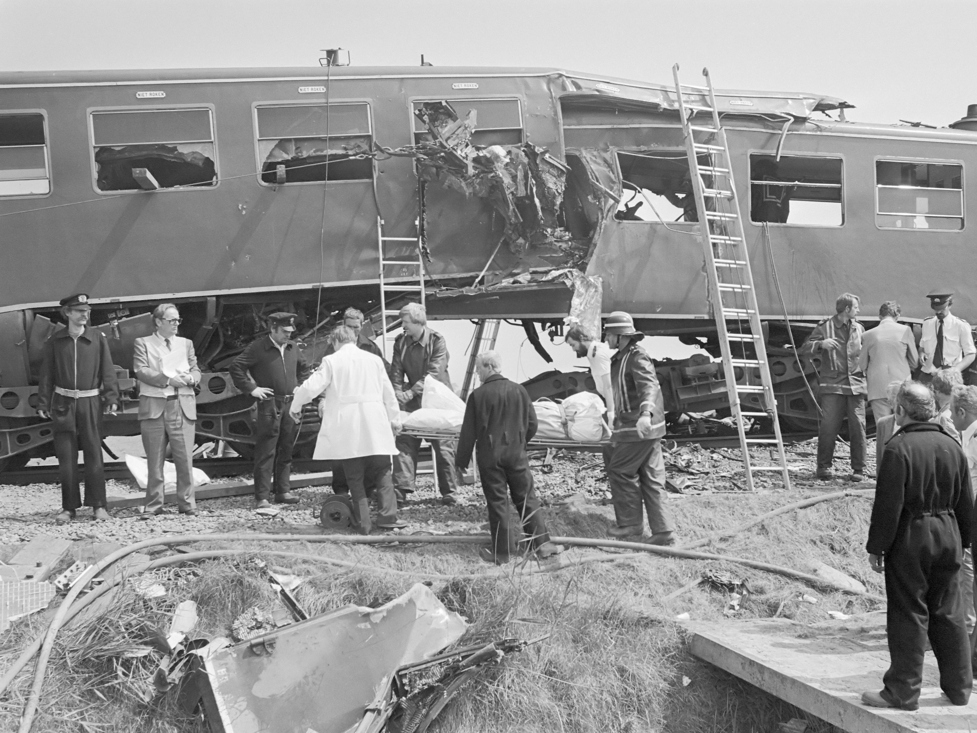 Treinramp te Sauwerd. Hulp bij de ramp 25 juli 1980